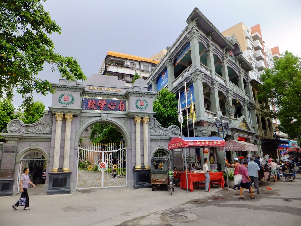 汕頭外馬路之存心善堂。